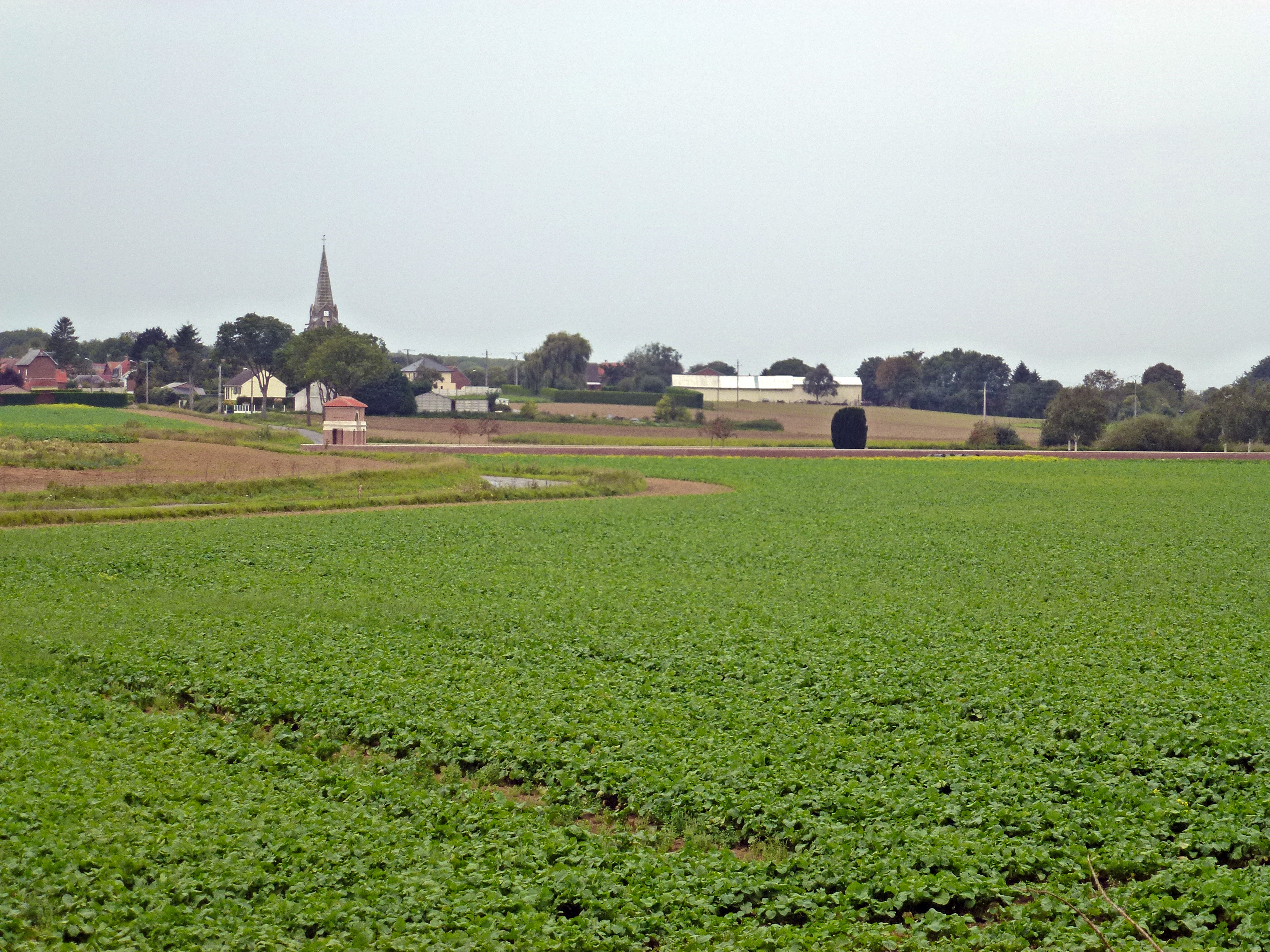 Vue du cimetière militaire et du village de Grévillers.